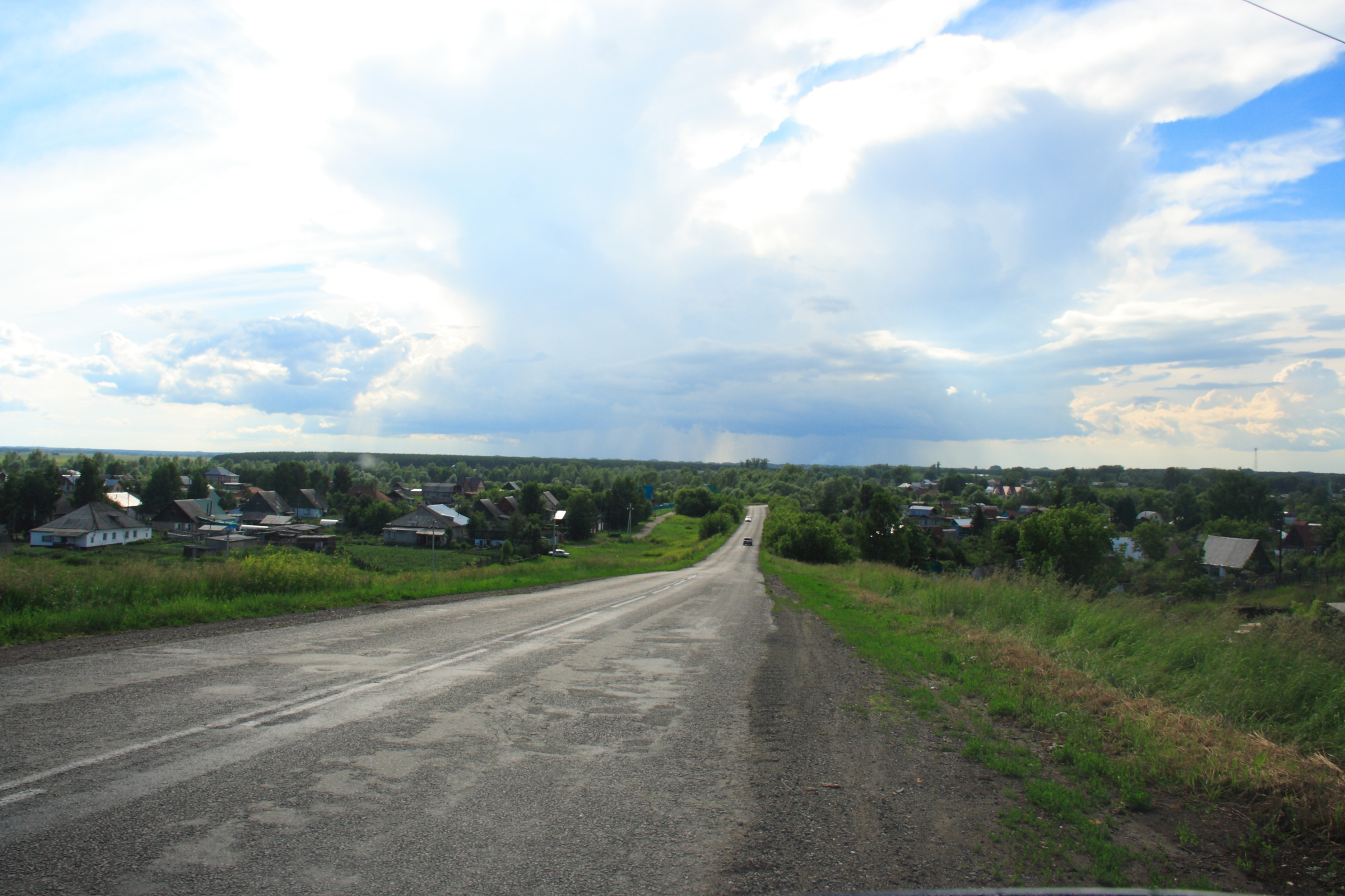 Кучево-дождевые облака над Зональным районом Алтайского края. Хорошо видно, что осадки под облаком распределены неравномерно